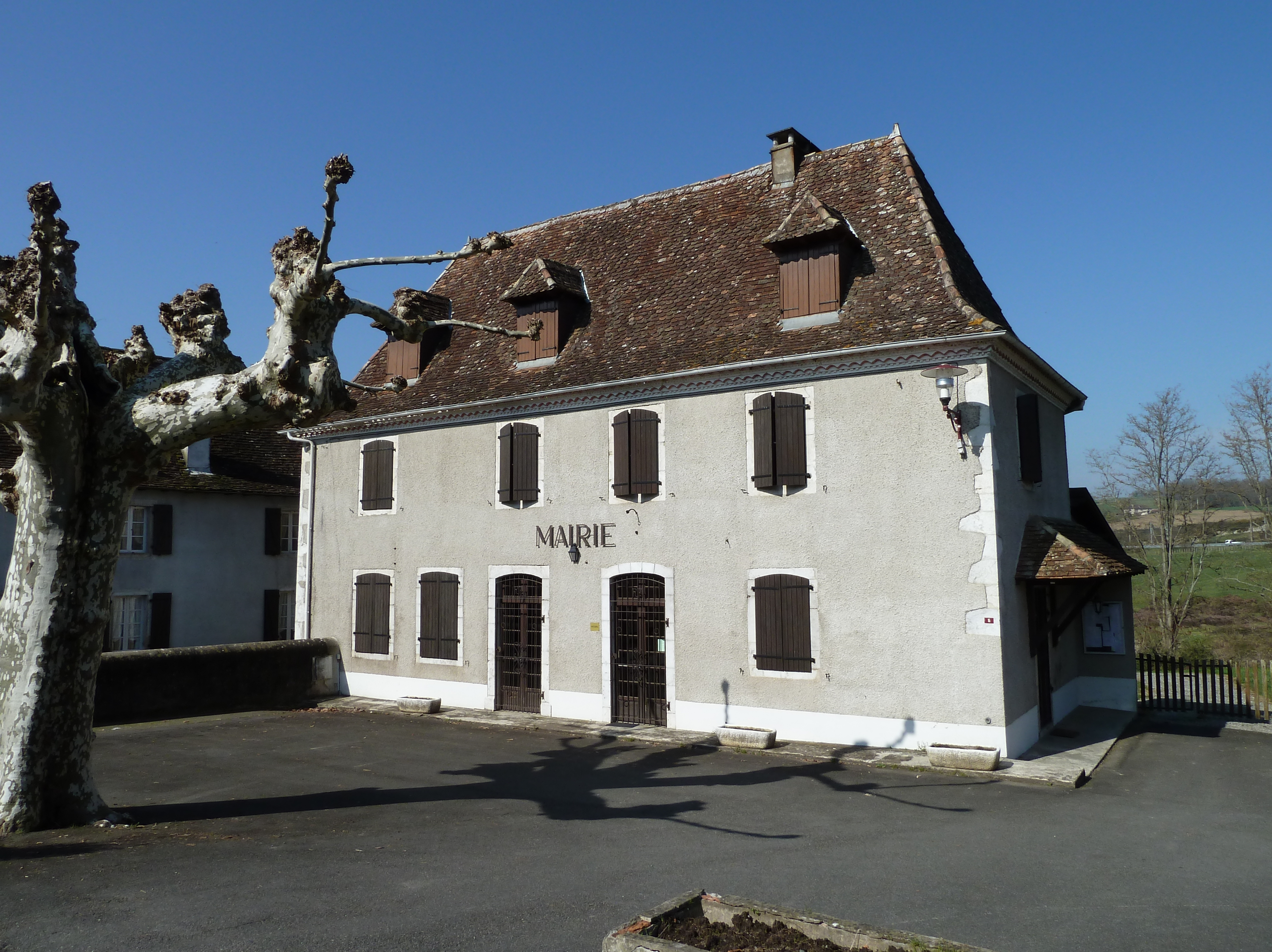 Mairie de Bérenx